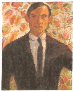 Selbstbildnis; Öl auf Leinwand, signiert